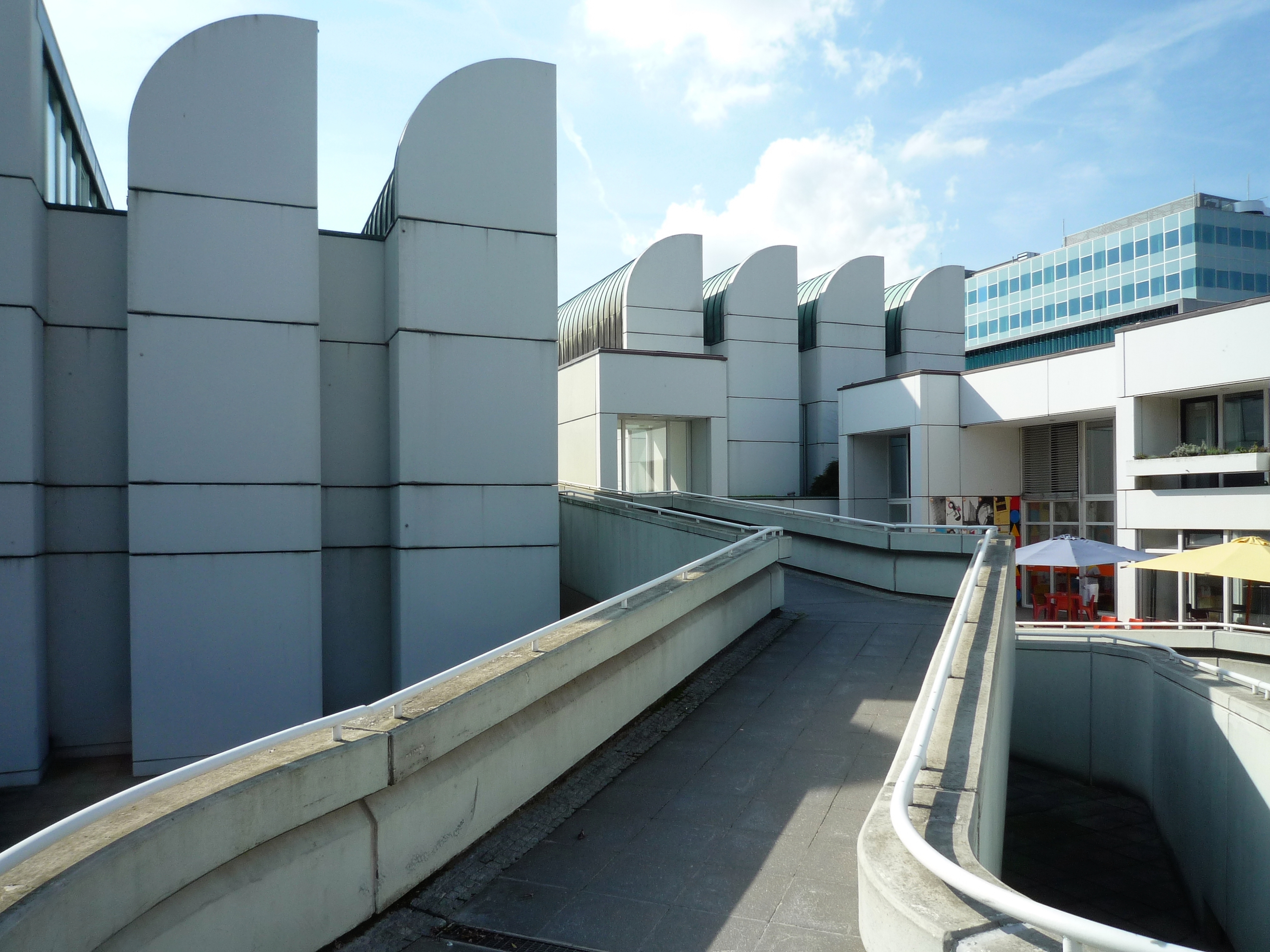 Bauhaus-Archiv, Museum für Gestaltung. Klingelhöfer Str. 14, 10785 Berlin. Fertiggestellt 1979 nach einem modifizierten Entwurf, den Walter Gropius 1964 ursprünglich für einen Standort in Darmstadt geliefert hatte. Seit 1997 unter Denkmalschutz. OBJ-Dok-Nr.: 090 50 377